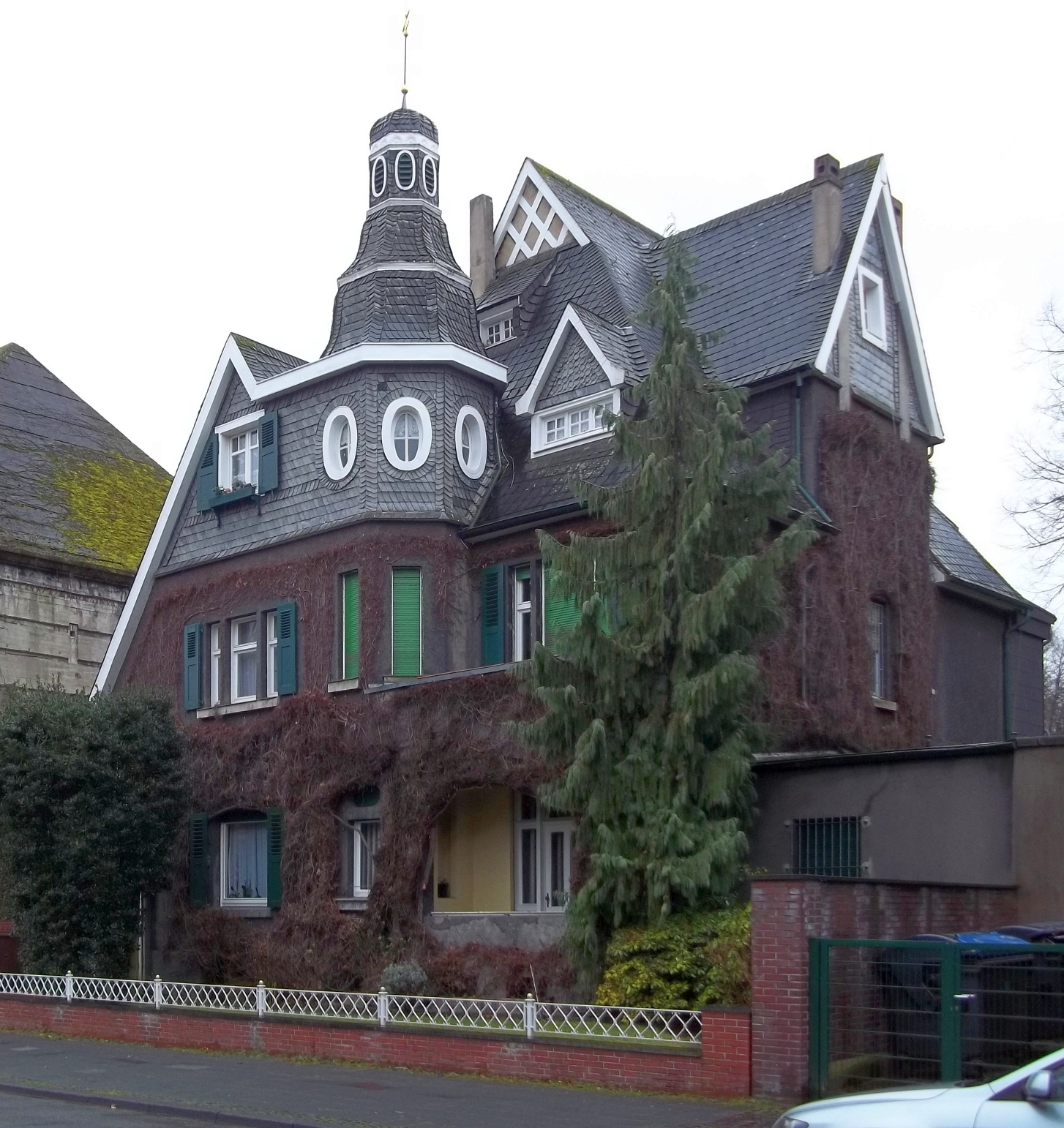 Villa Langekampstr. 35 in Herne-Wanne This is a photograph of an architectural monument.